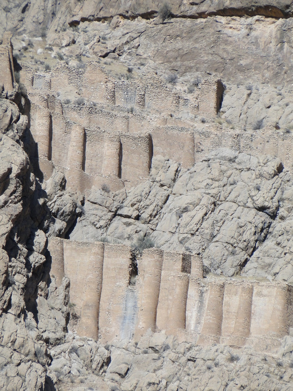 برکه نوع اول